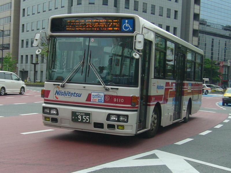 登録番号 福岡200か・955 西日本鉄道百道浜自動車営業所所属 車番9110 2007年4月30日 天神北交差点にて撮影